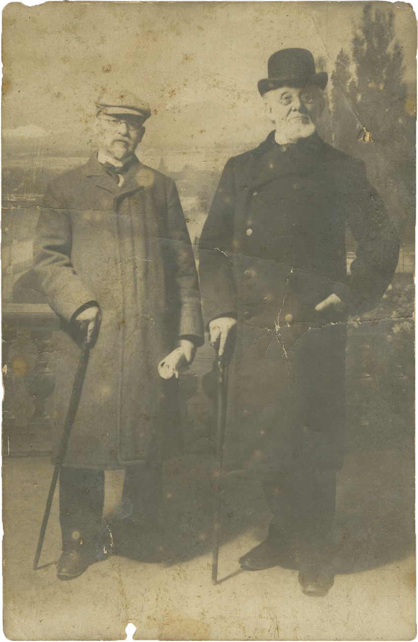 Mordekhai Ben-Ami and Mendele Mocher Sforim in Geneva in 1907